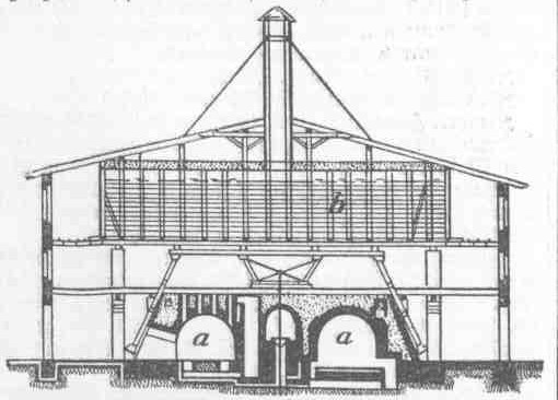 Schnitt durch einen Ringofen